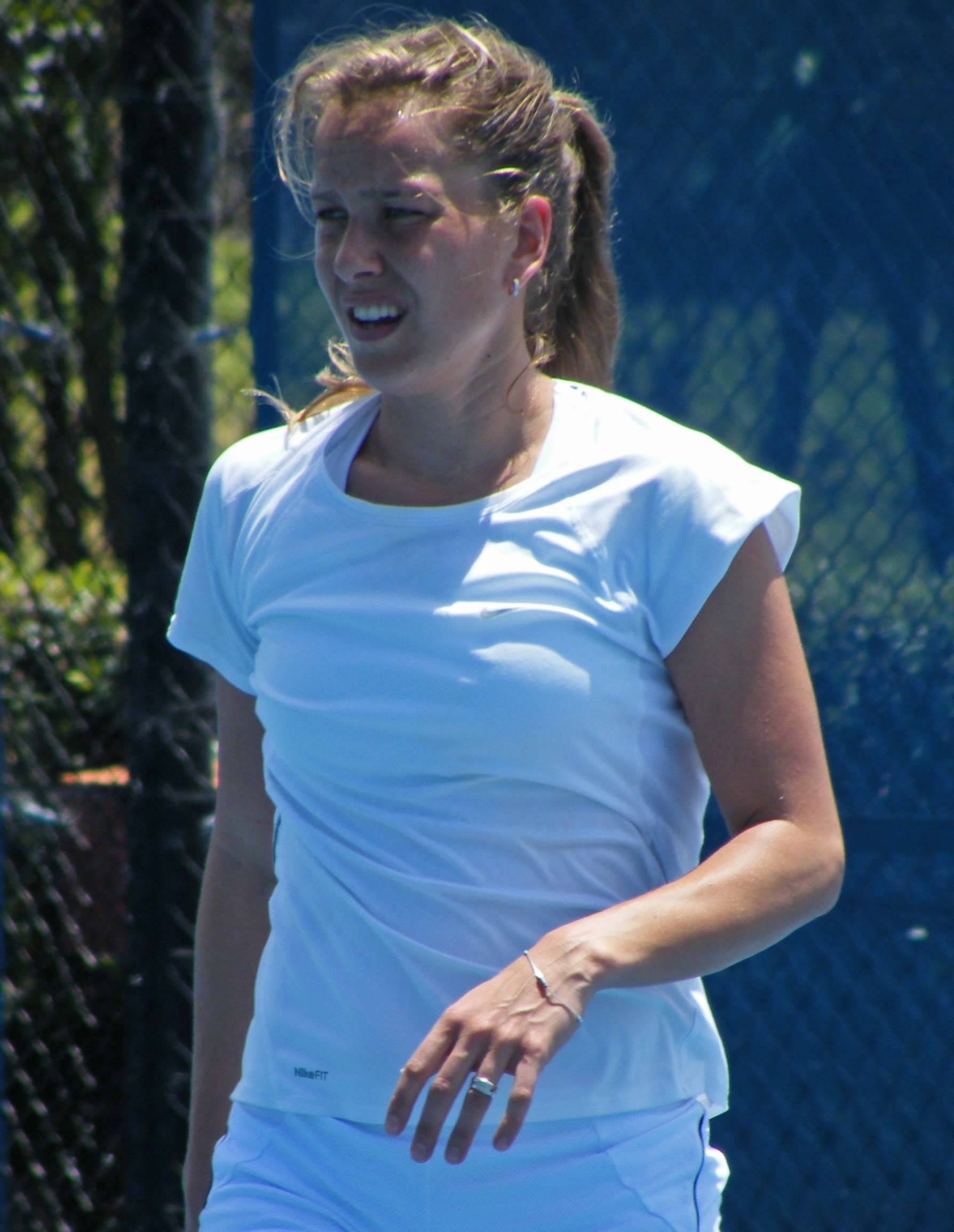 Barbara zahlavova strycova